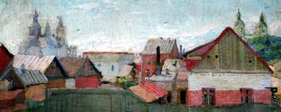 Иван Димич (1879-1940?) Вид Пинска. Иван Димич, масло. Музей Белорусского Полесья